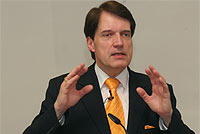 ^Prof. Dr. Karl-Georg Loritz auf einem Vortrag